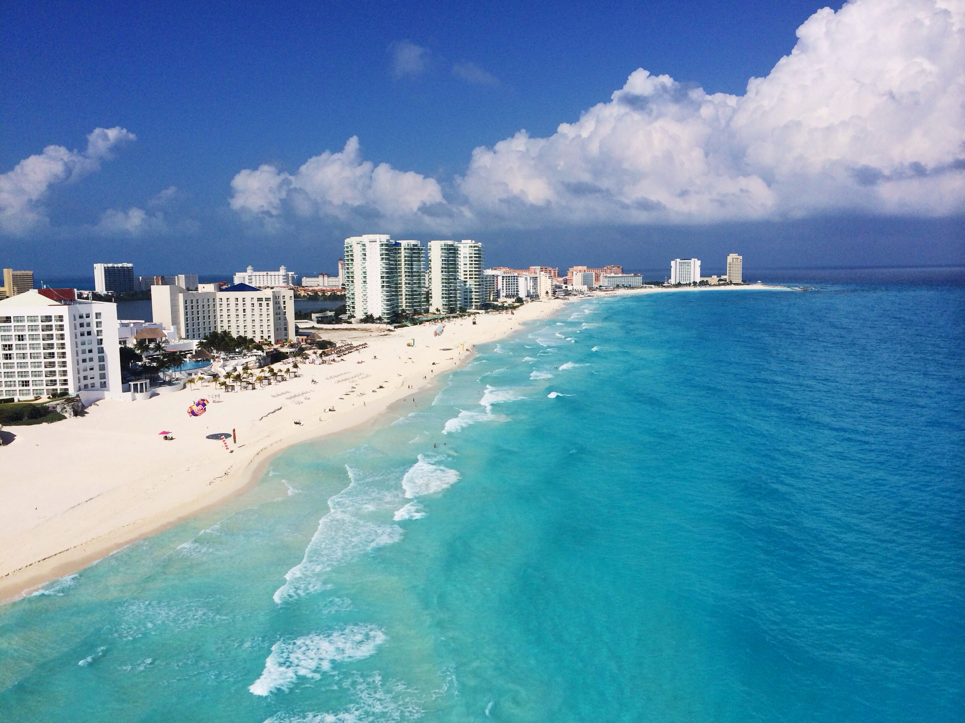 Vista de la playa de Cancún desde paracaídas